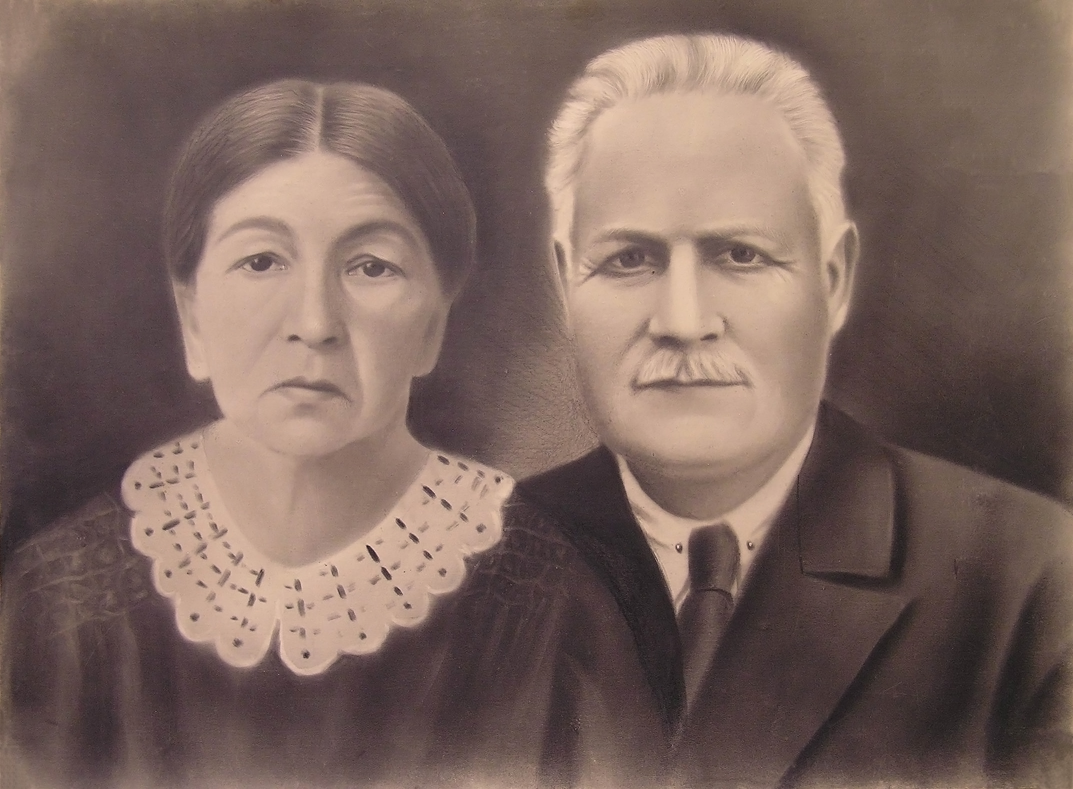 семейное фото Олимпиады и Казимира Козловских